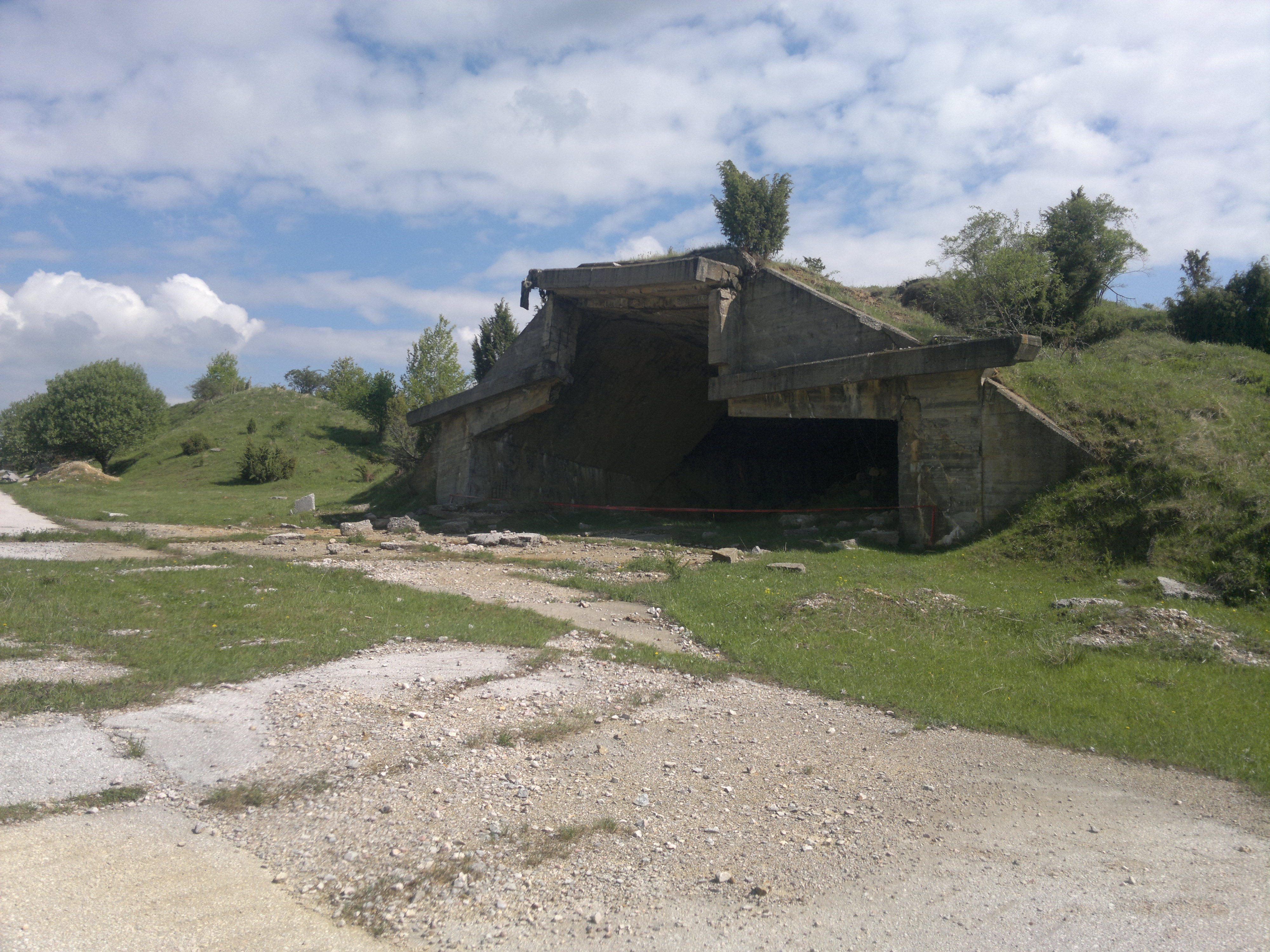 I fotografija je radioaktivna